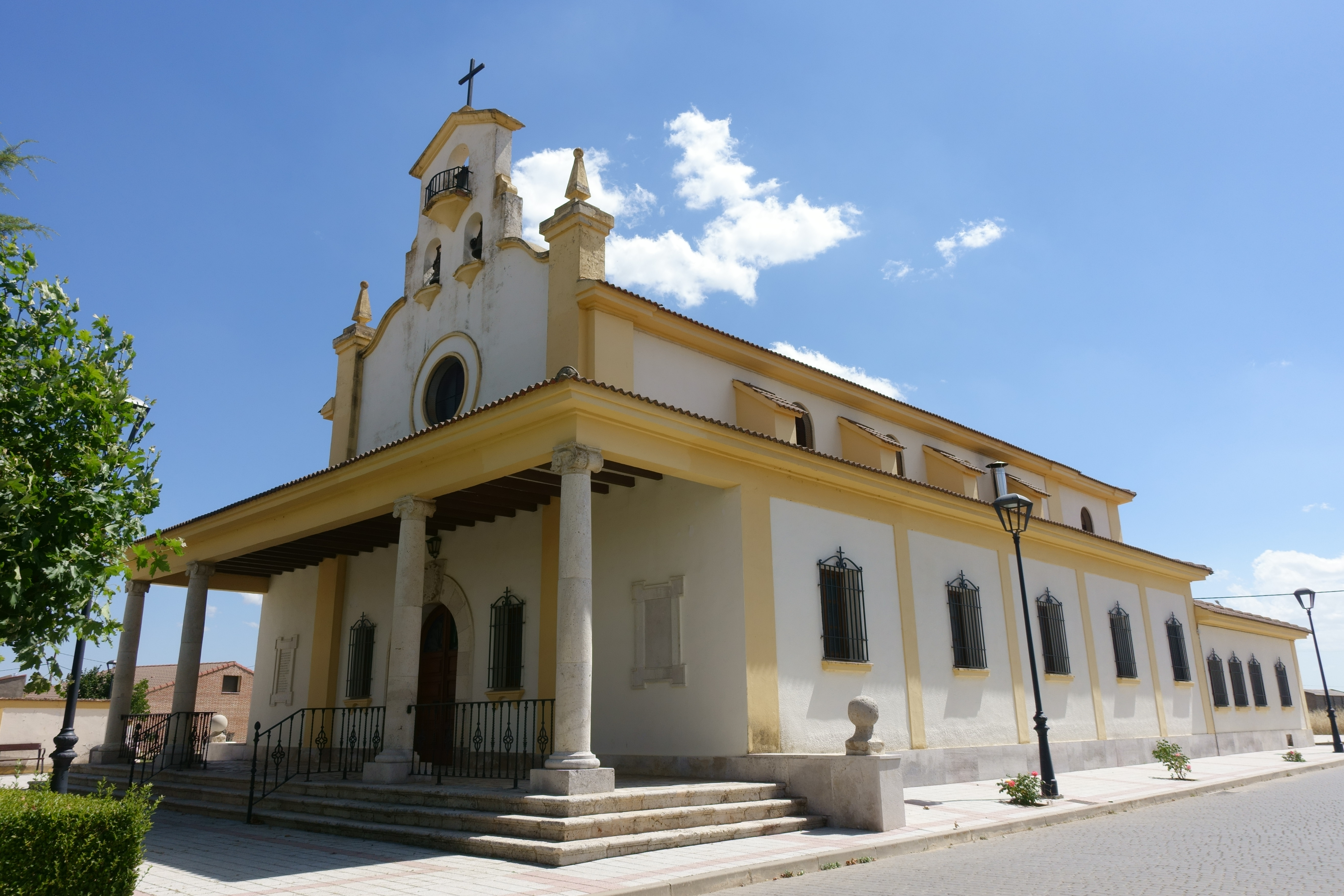 Iglesia de Santa Columba, en Cervatos de la Cueza (Palencia, España).